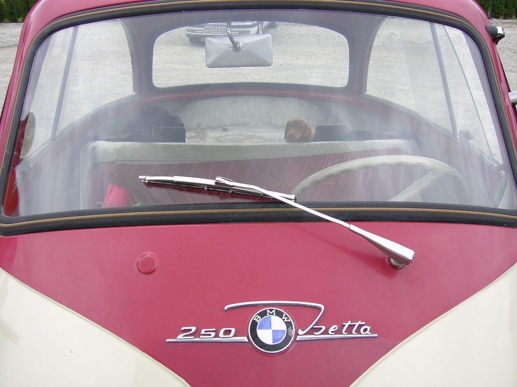 Isetta 250 - frontal